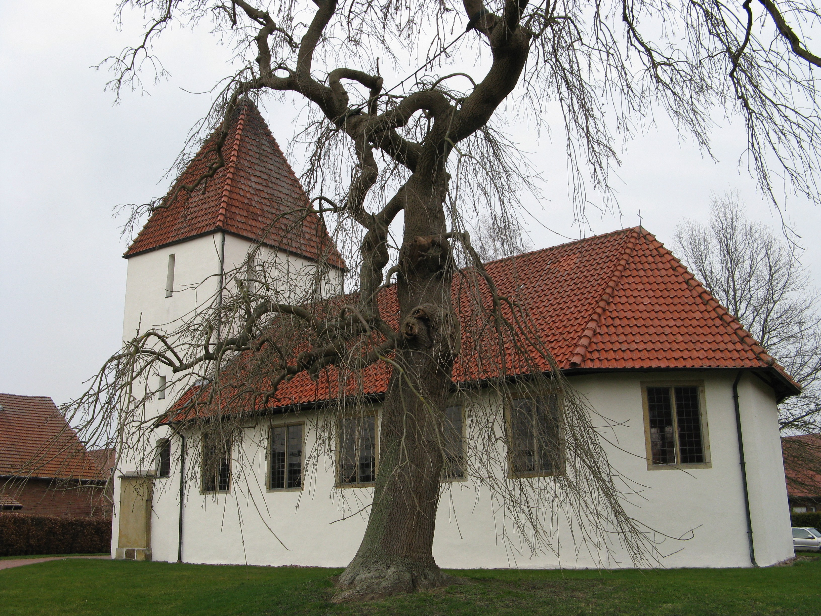 Kirche in Holzhausen This image shows a heritage building in Germany, located in the North Rhine-Westphalian city Hille (no. 17).